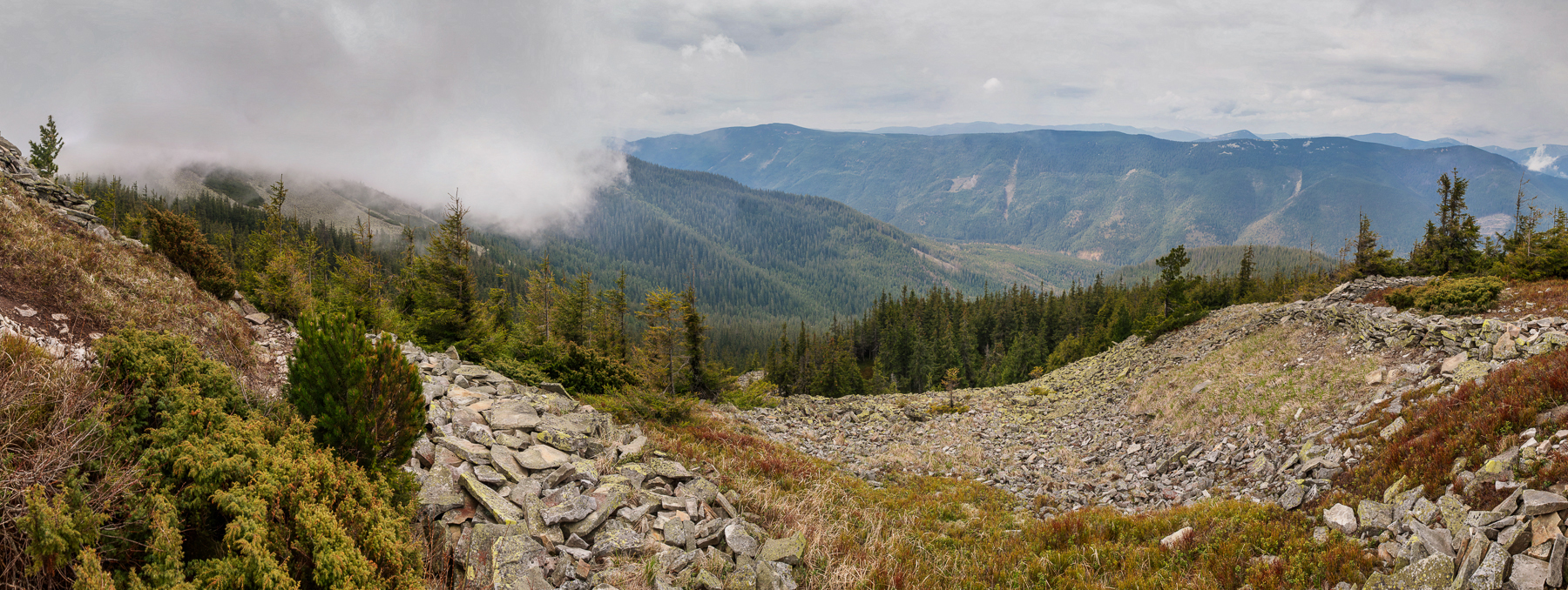 Панорама з гори Боревка в південно-західному напрямку